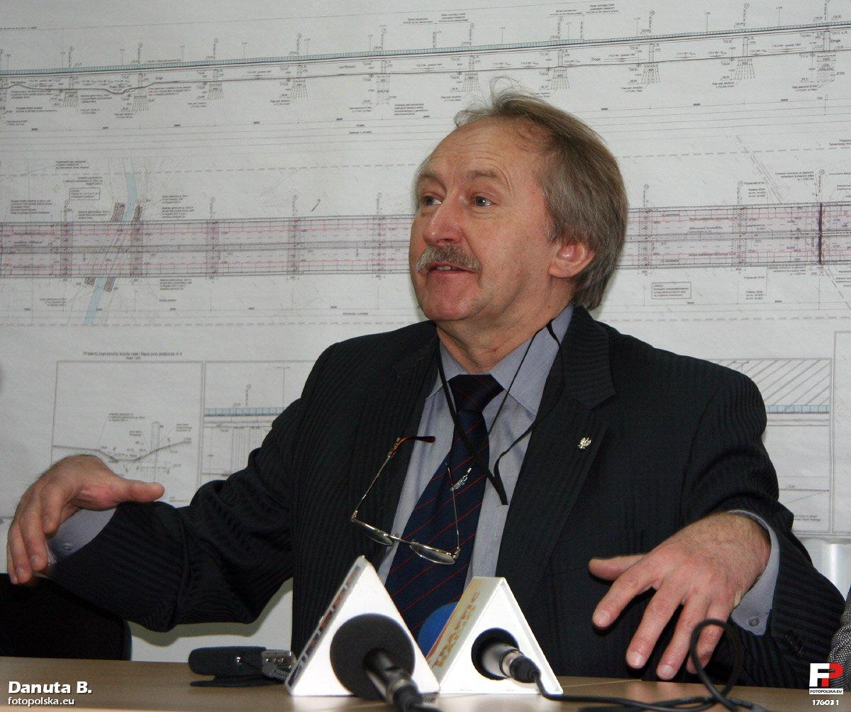 To jedna z ważniejszych osób na budowie - projektant mostu - prof. Jan Biliszczuk na tle rzutu i przekroju. Nawiasem mówiąc edycja papierowa tego projektu kosztować musiała niemało.